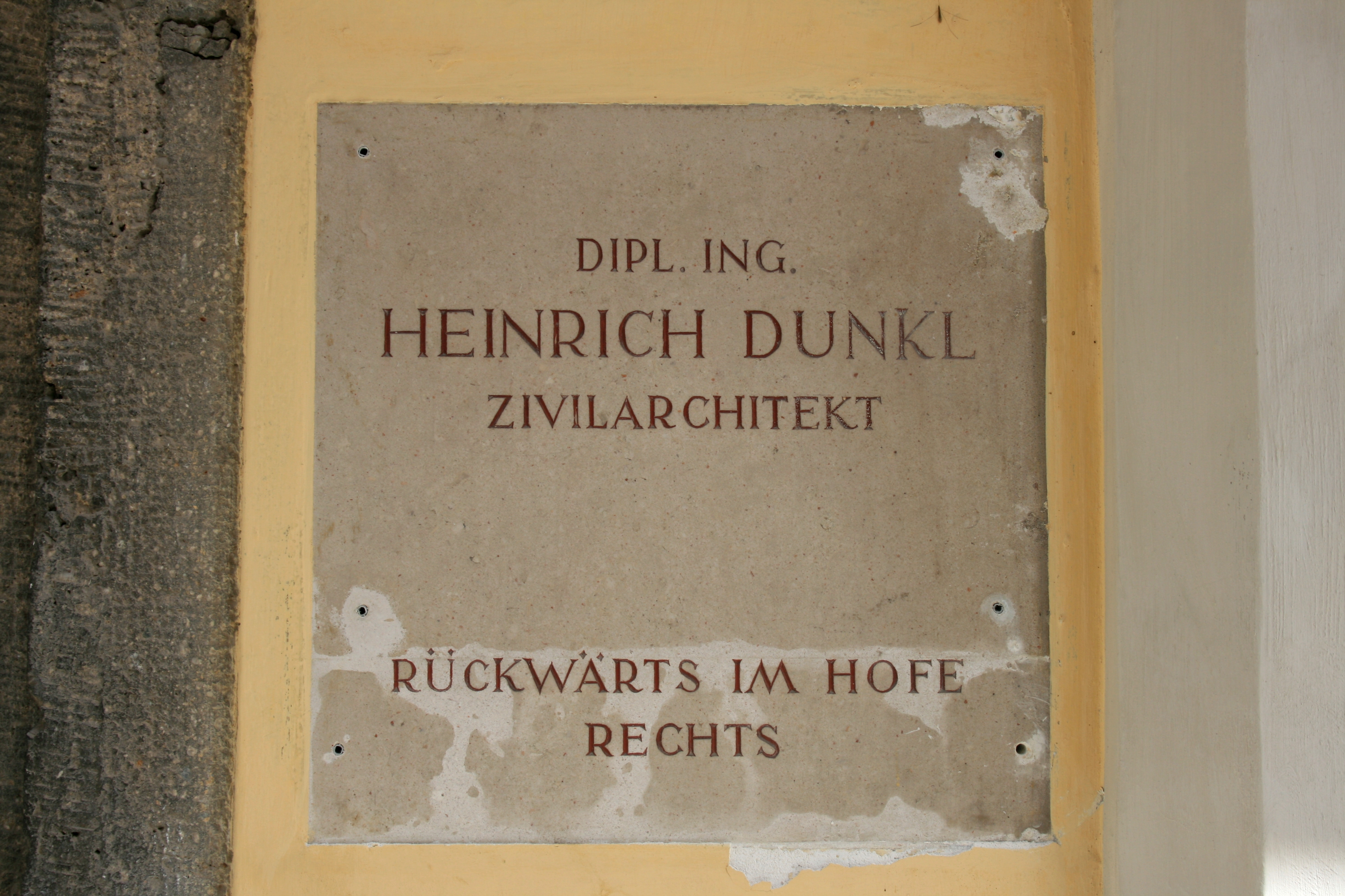 Schild des ehemaligen Architekturbüros Heinrich Dunkl am Steyrer Dunklhof (rechts vom Eingangstor)